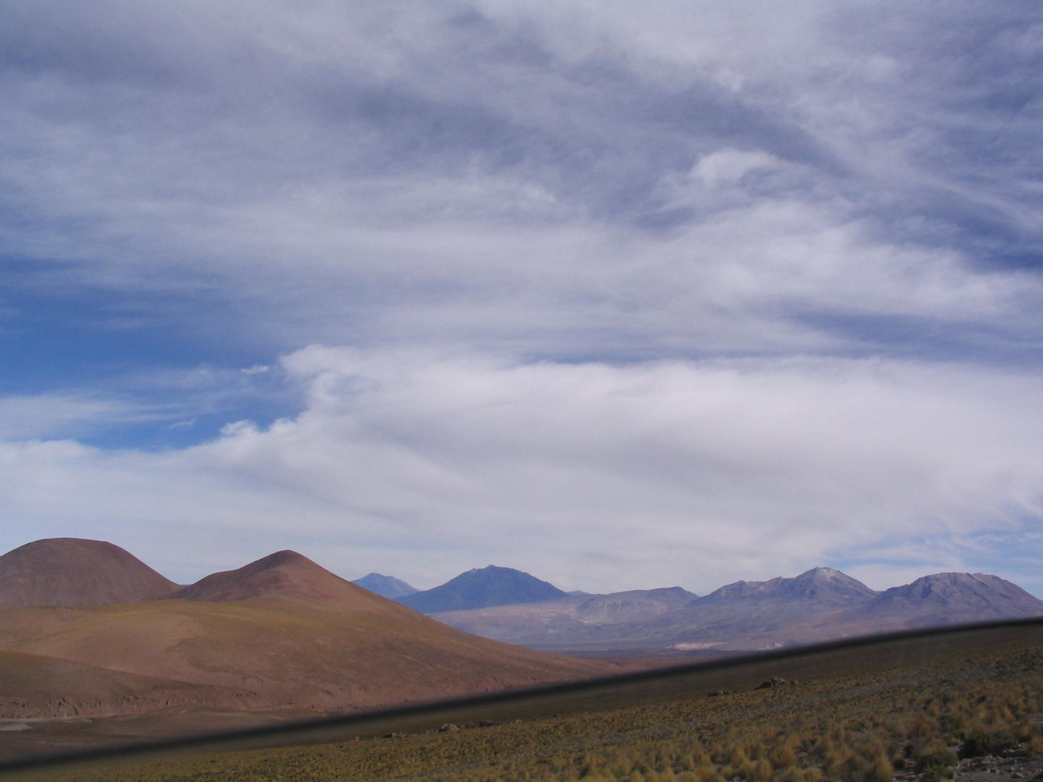 San Pablo, Paniri, Chao, Cerro del León, Toconce volcanoes, Chile.